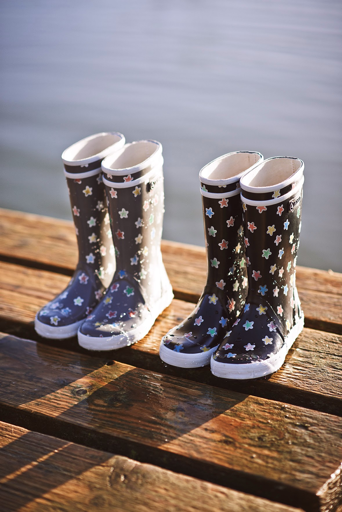 Lollypop